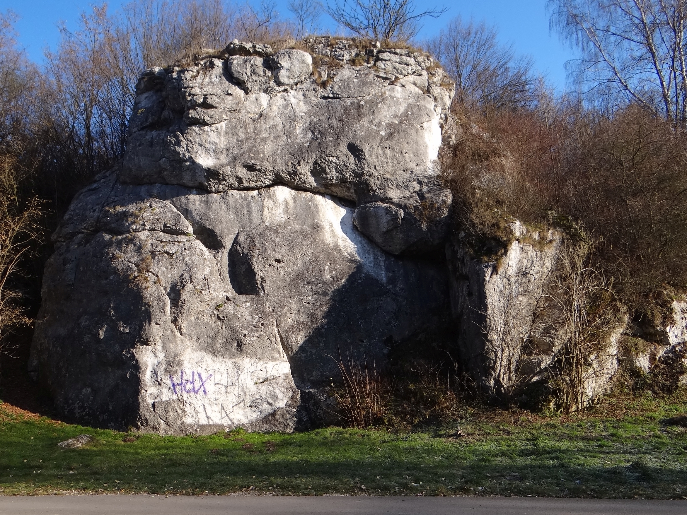 Przydrożne Skały w Dolinie Kobylańskiej. Skała 1